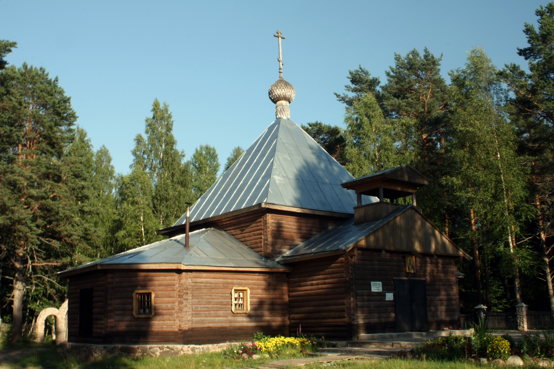 Церковь Святителя и Чудотворца Николая - 2010